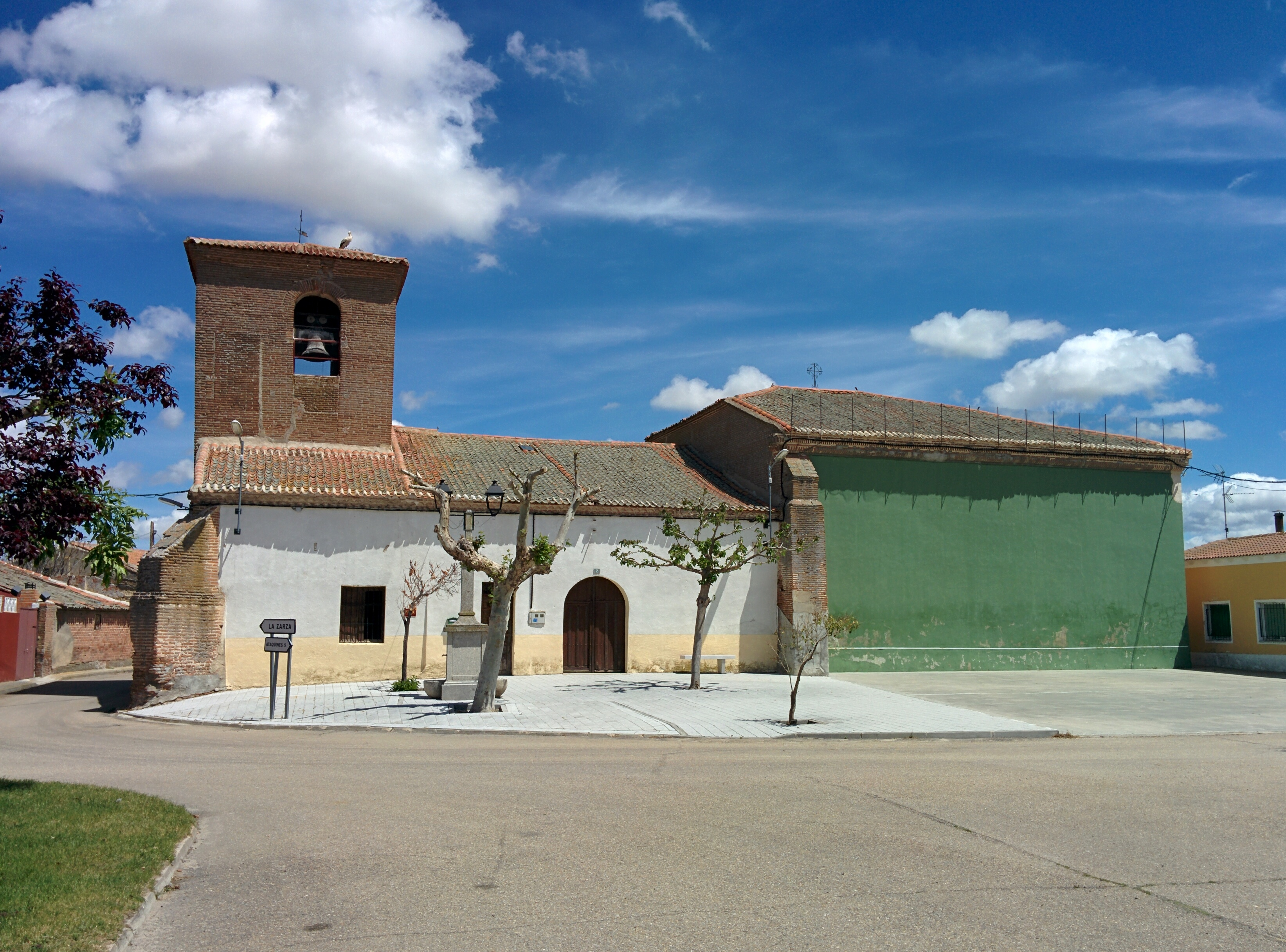 Iglesia de San Miguel Arcángel, en Ramiro (Valladolid, España).